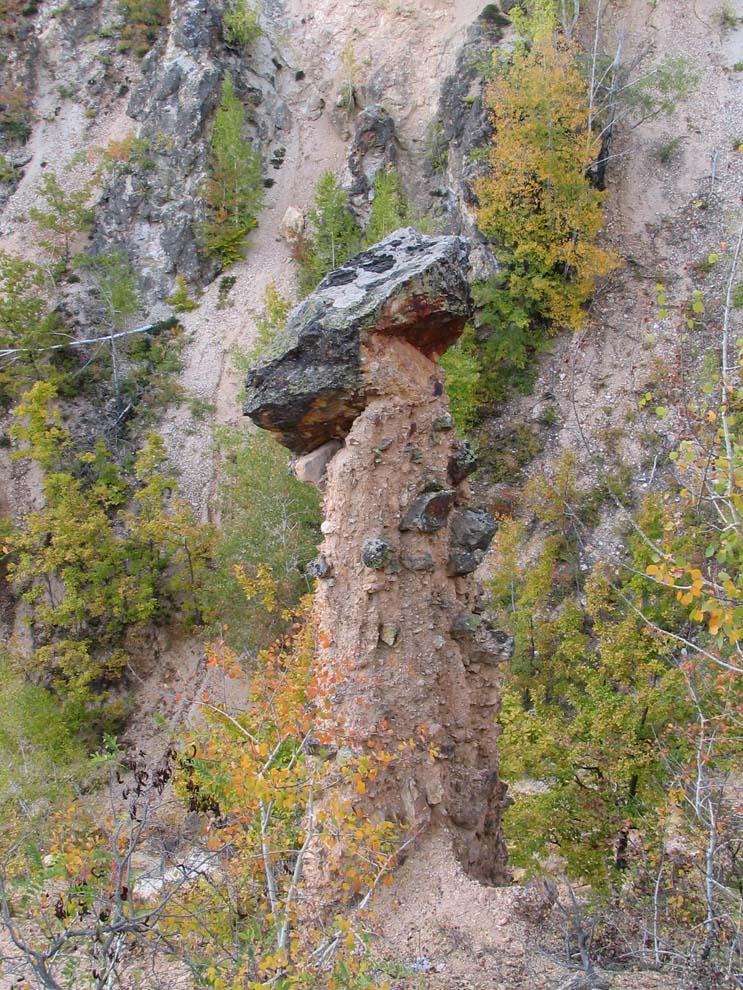 Đavolja varoš